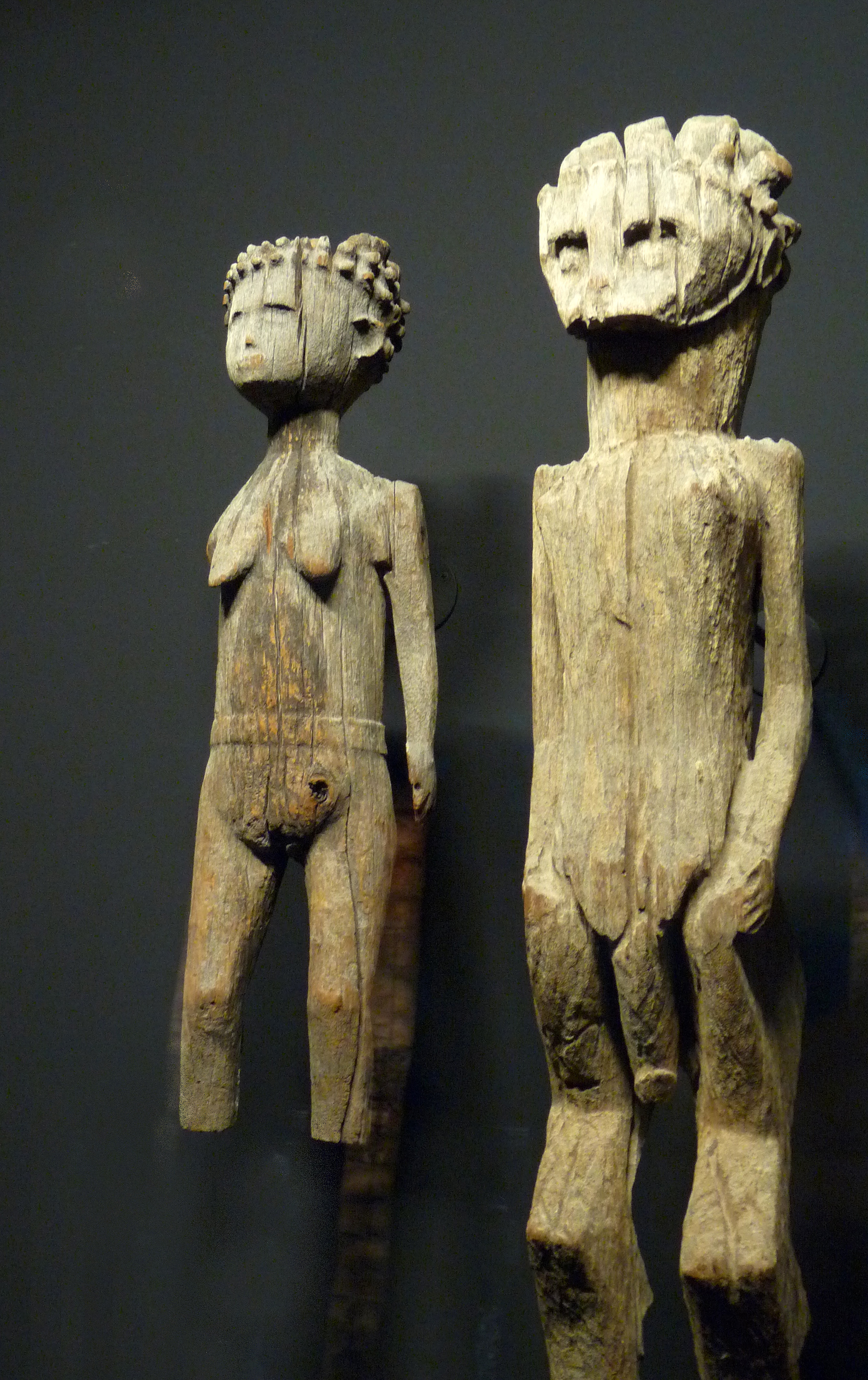 Statues funéraires, population Sakalava, Madagascar. 19e-20e siècle. Bois. Musée du quai Branly.